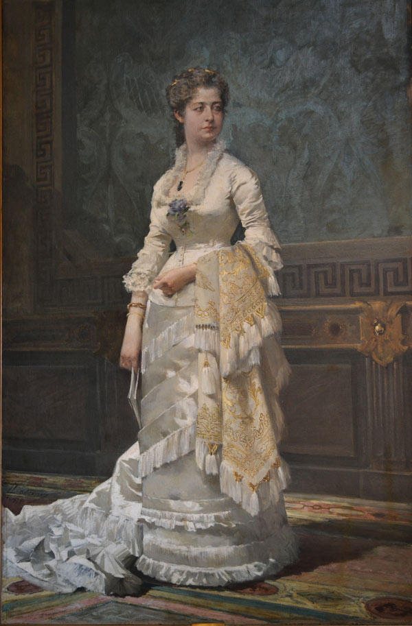 Retrato de la actriz española María Tubau (1854-1914).